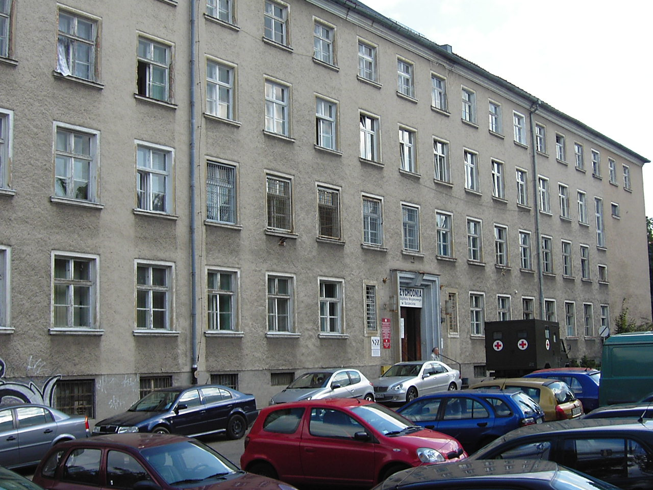 Szpital wojskowy w Szczecinie (poliklinika). Wcześniej była Wojskowa Komenda uzupełnień i WZRKB